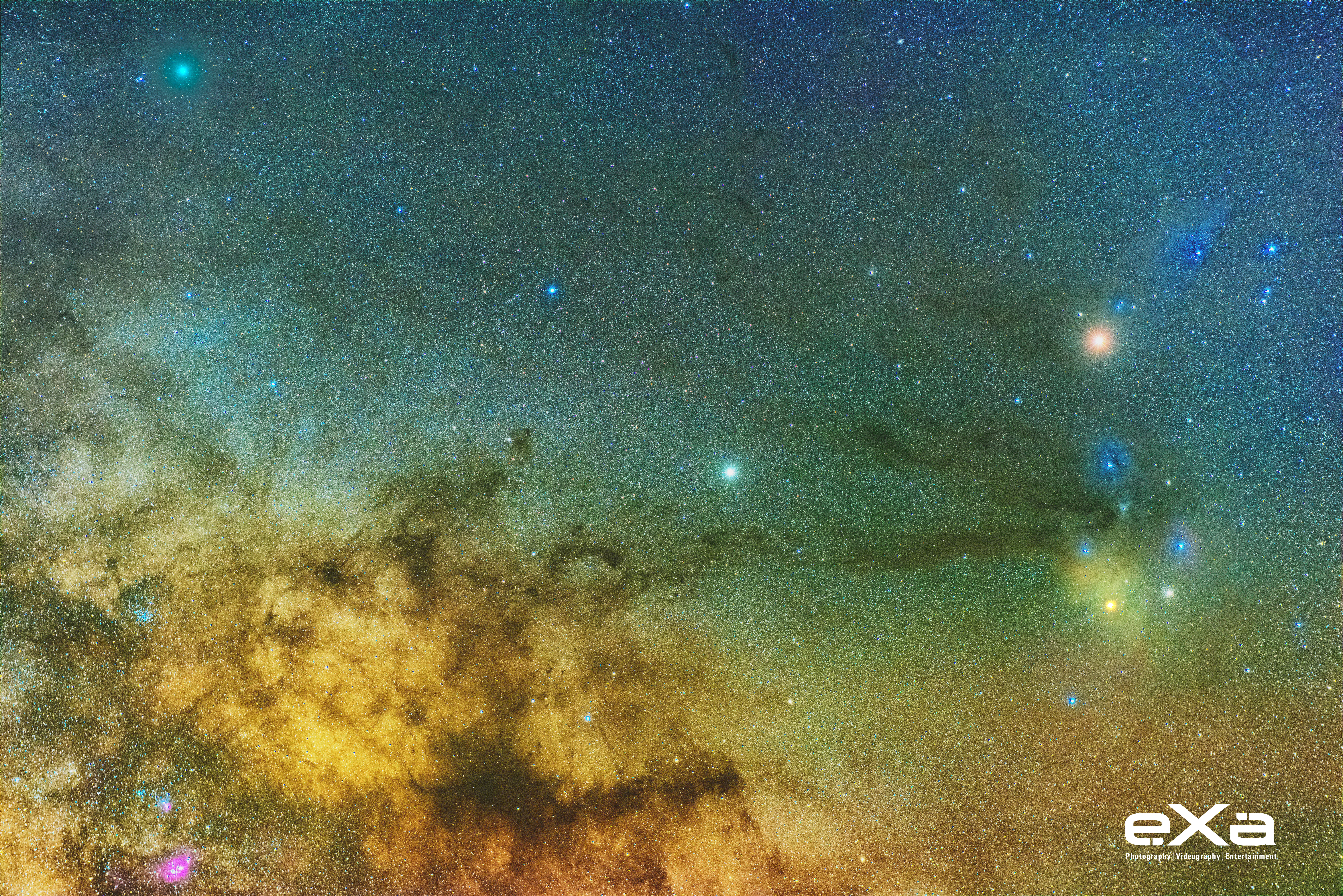 Монгол: Зүүн дээд буланд 252P/LINEAR сүүлт од, Сүүн замын төв, Ангараг, Санчир, Хилэнцийн мананцар, Антерас, Lagoon мананцар (M8), Trifid мананцар (M20), VdB каталогийн 100-108-р мананцарууд, 6ш бөмбөлгөн оддын бөөгнөрөл M4, NGC6144, M80, M23, M21, M19 зэрэг багтсан болно.